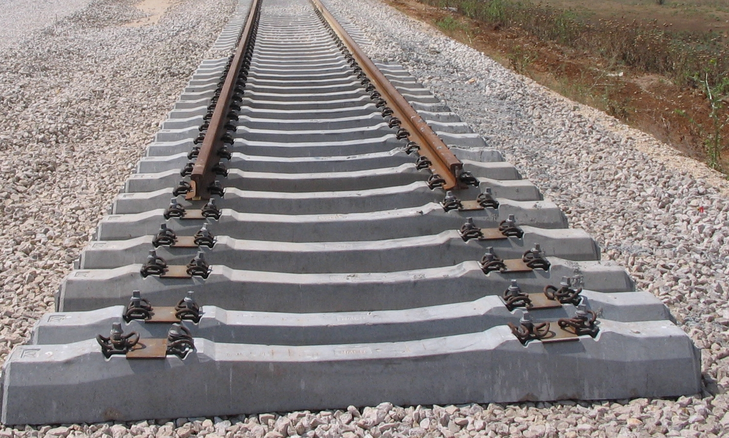 אדני בטון בהנחת המסילה למודיעין